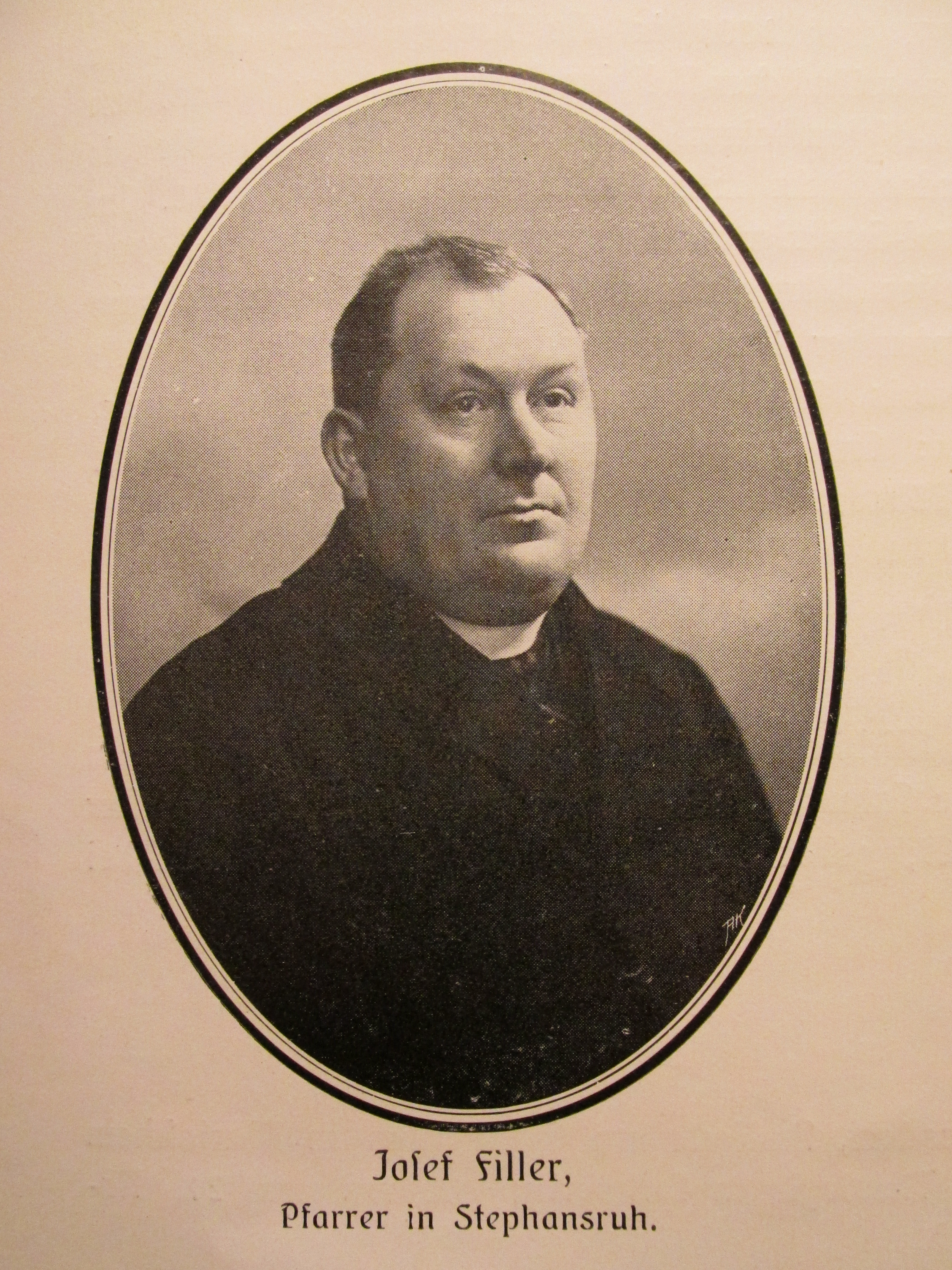 P. Josef Filler; * 02. 05. 1869 Hoštěnice, čp. 21; syn: Jana Filler - sedlák, syn Josefa Fillera - sedláka a Barbory roz. Fujer; Marie, dcera Josefa Pouvy - sedláka z Černiva a Marie roz. Hauptvogel; gymnaziální studia na Reálném Gymnáziu v Roudnici nad Labem; filosoficko - teologická studia v Litoměřicích; ord. na kněze 1893; kaplan v "Hochstadt a. J."; kaplan v "Boskow"; kaplan v Semilech; administrátor v Semilech; administrátor v "Reichenau"; administrátor v "Hermannstal"; farář v "Stephansruh"; zakladatel a první předseda Jednoty katolické v Semilech; zakladatel Křesťansko sociálního klubu pro politický okres Semily,; "Starkenbach", Jičín, Nový Bydžov; vydavatel dramatických děl: "Heil. Julia", "Heil Elisabeth", "Das arme Jesulein" (to vyšlo v češtině); obnovitel "Herz Jesu - Vereines" v Hermannstal